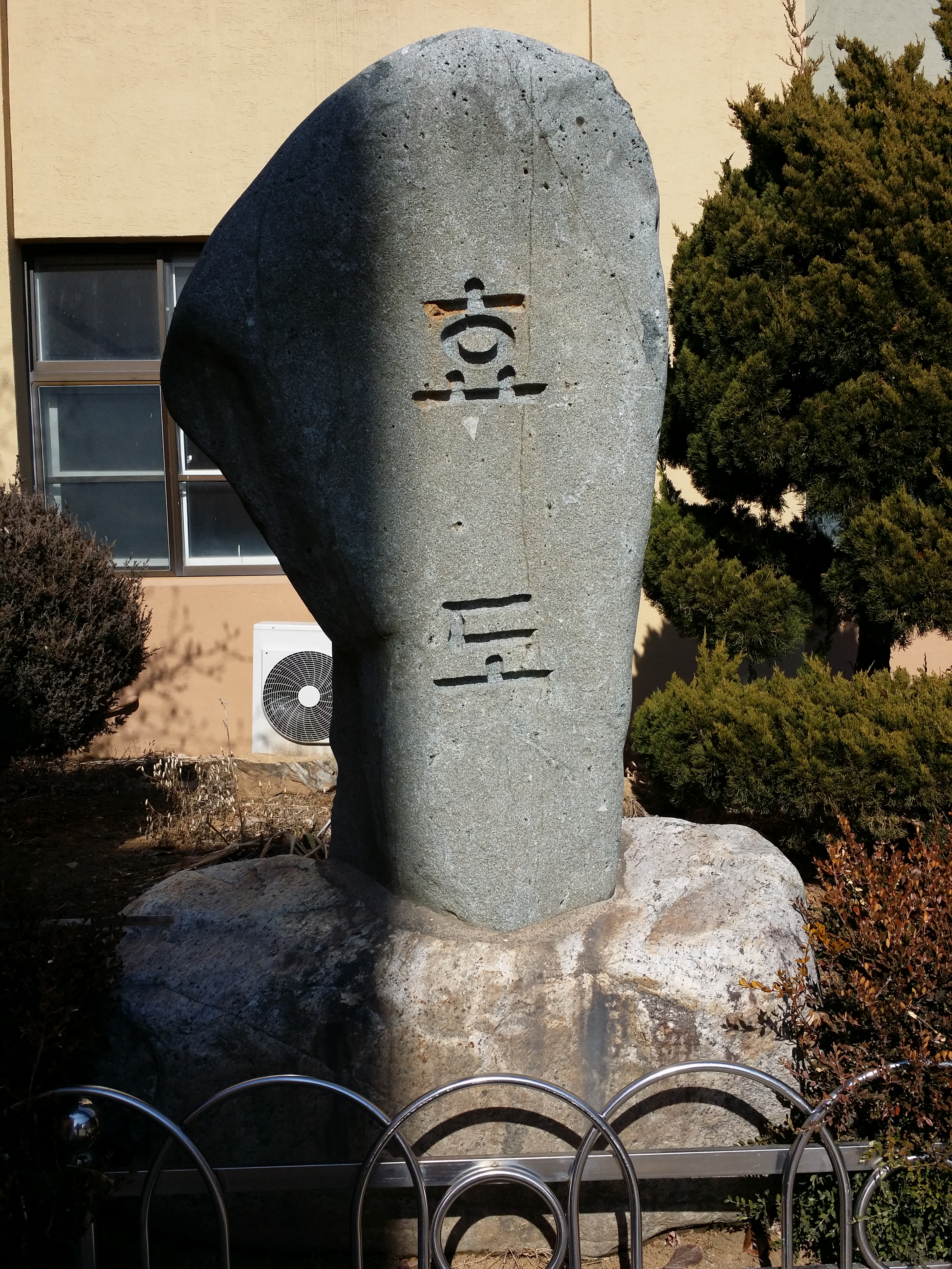 관양초등학교에 있는 한자로 효도라 적힌 비석